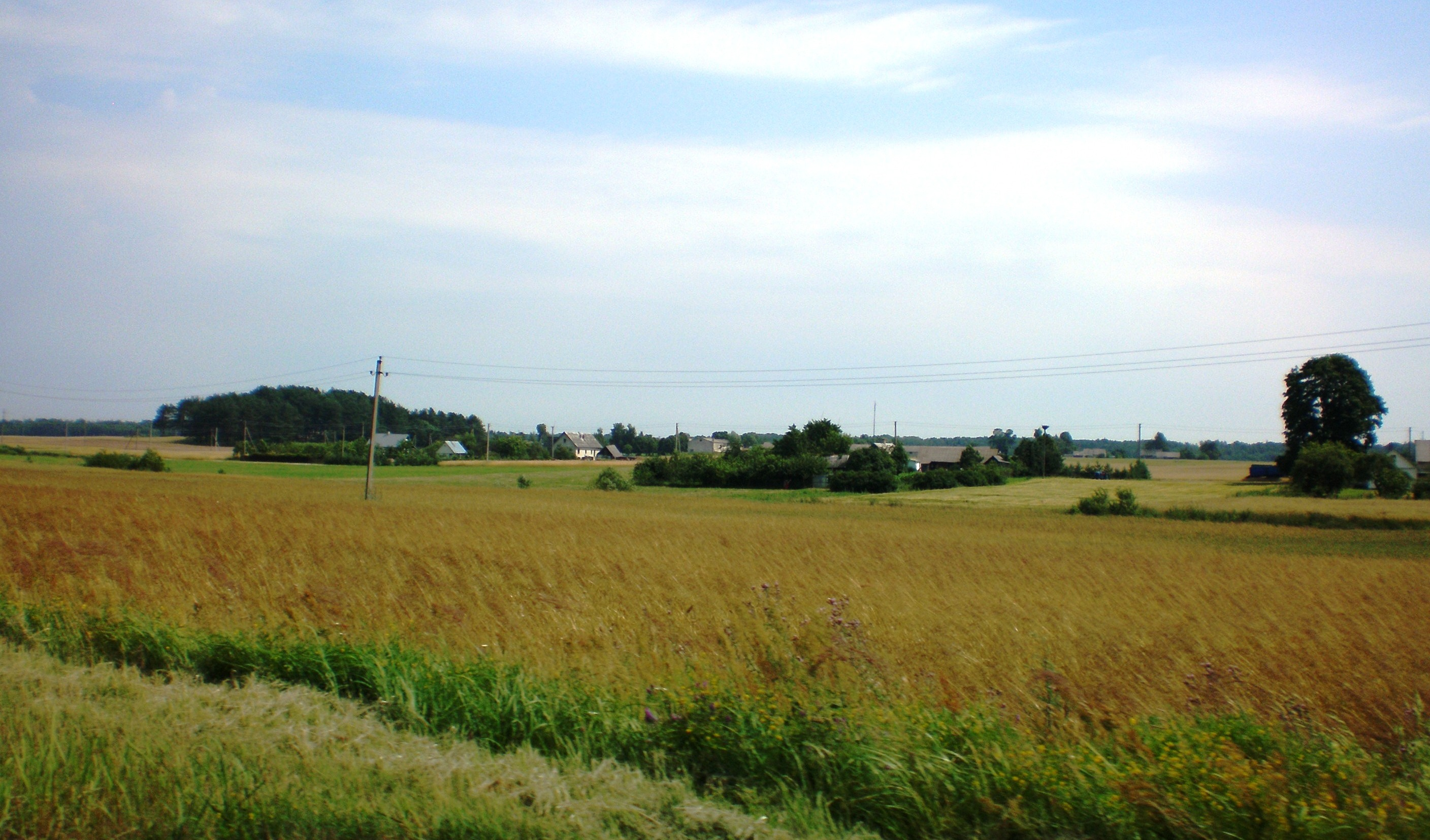 Gelnai, Kėdainių raj.